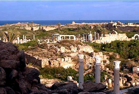 Le chalcidium vu depuis le théâtre